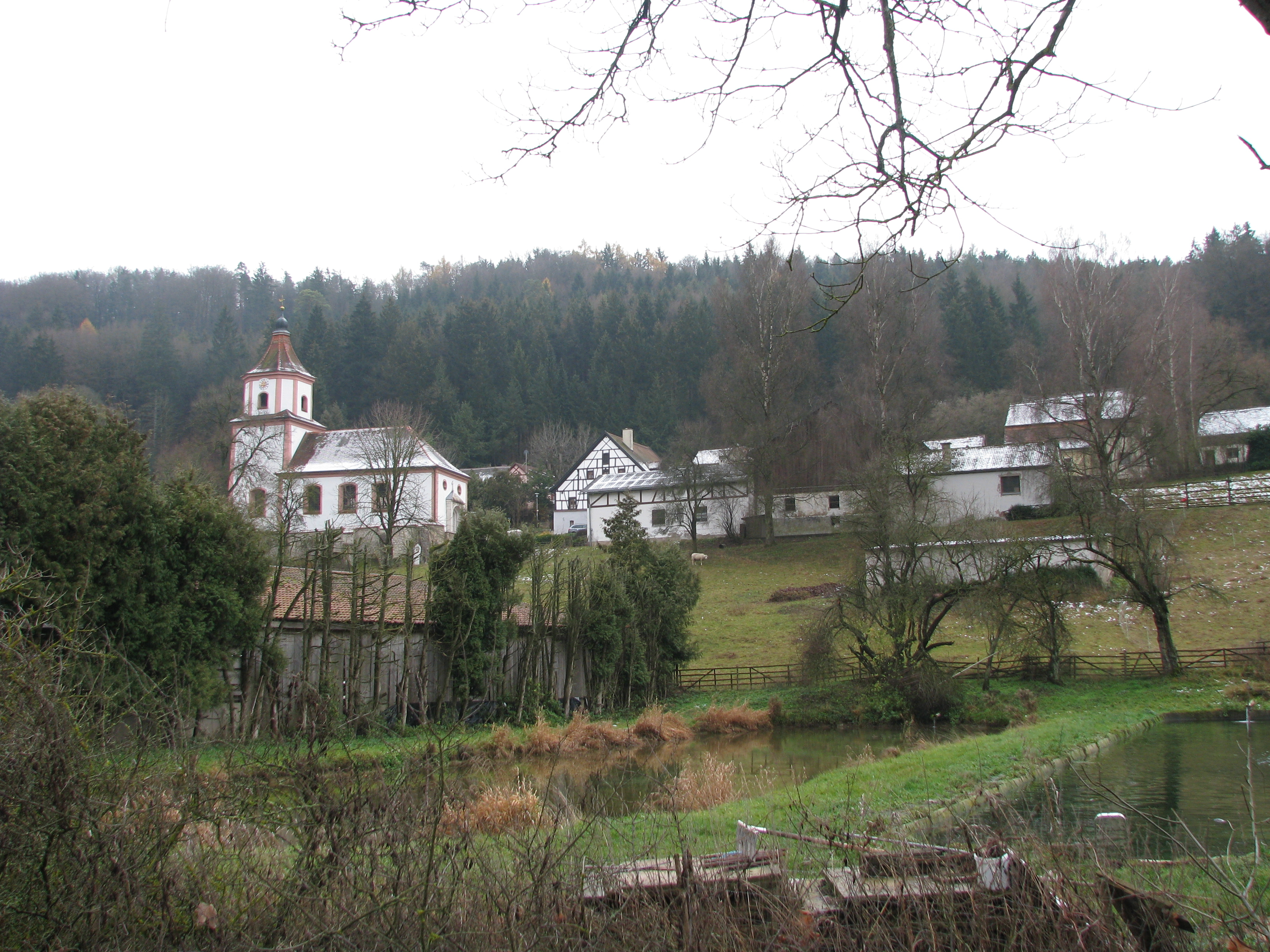 Heimbach, Ortsteil von Greding im mittelfränkischen Landkreis Roth in Bayern